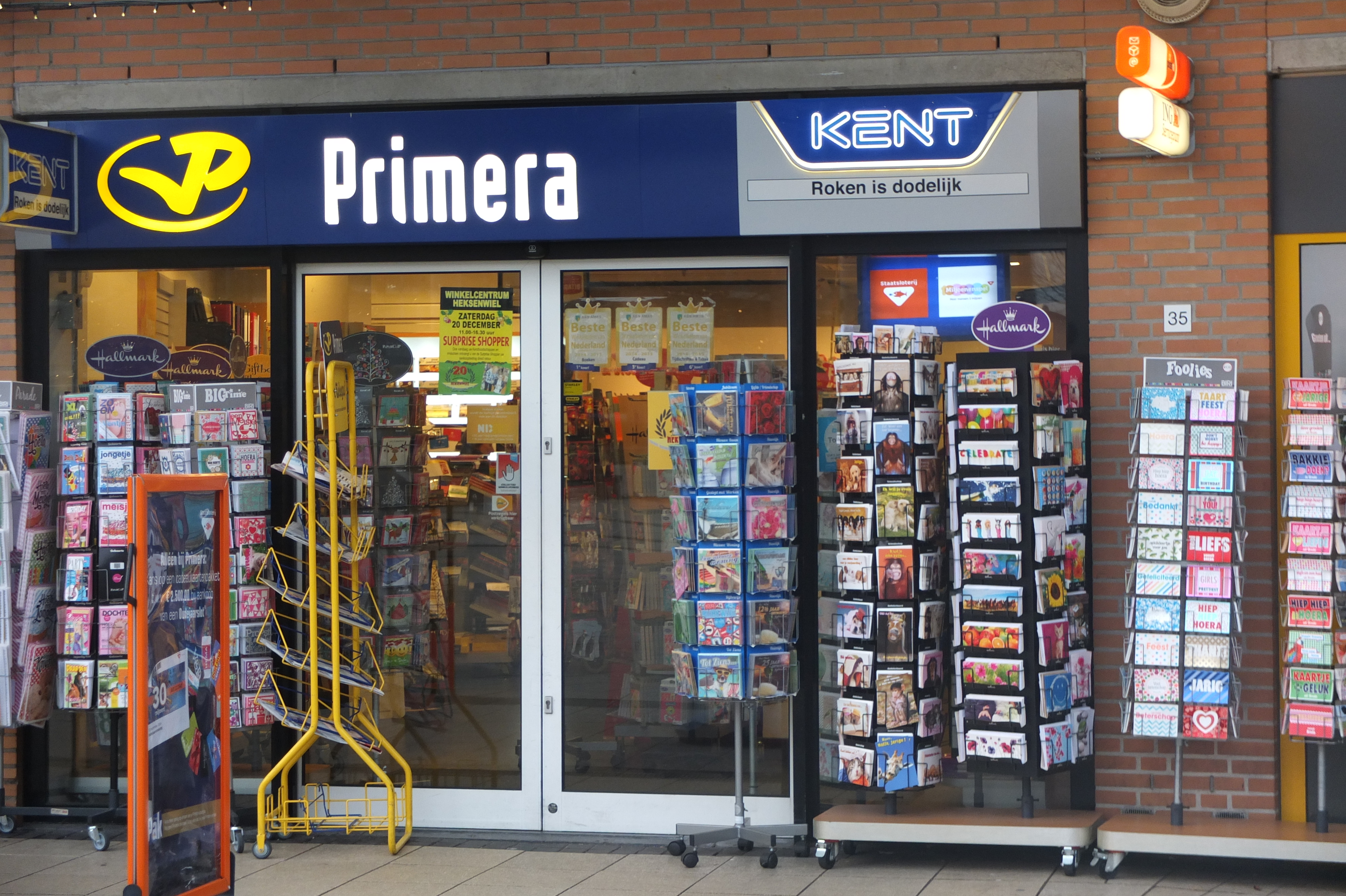 Primera in Winkelcentrum Heksenwiel